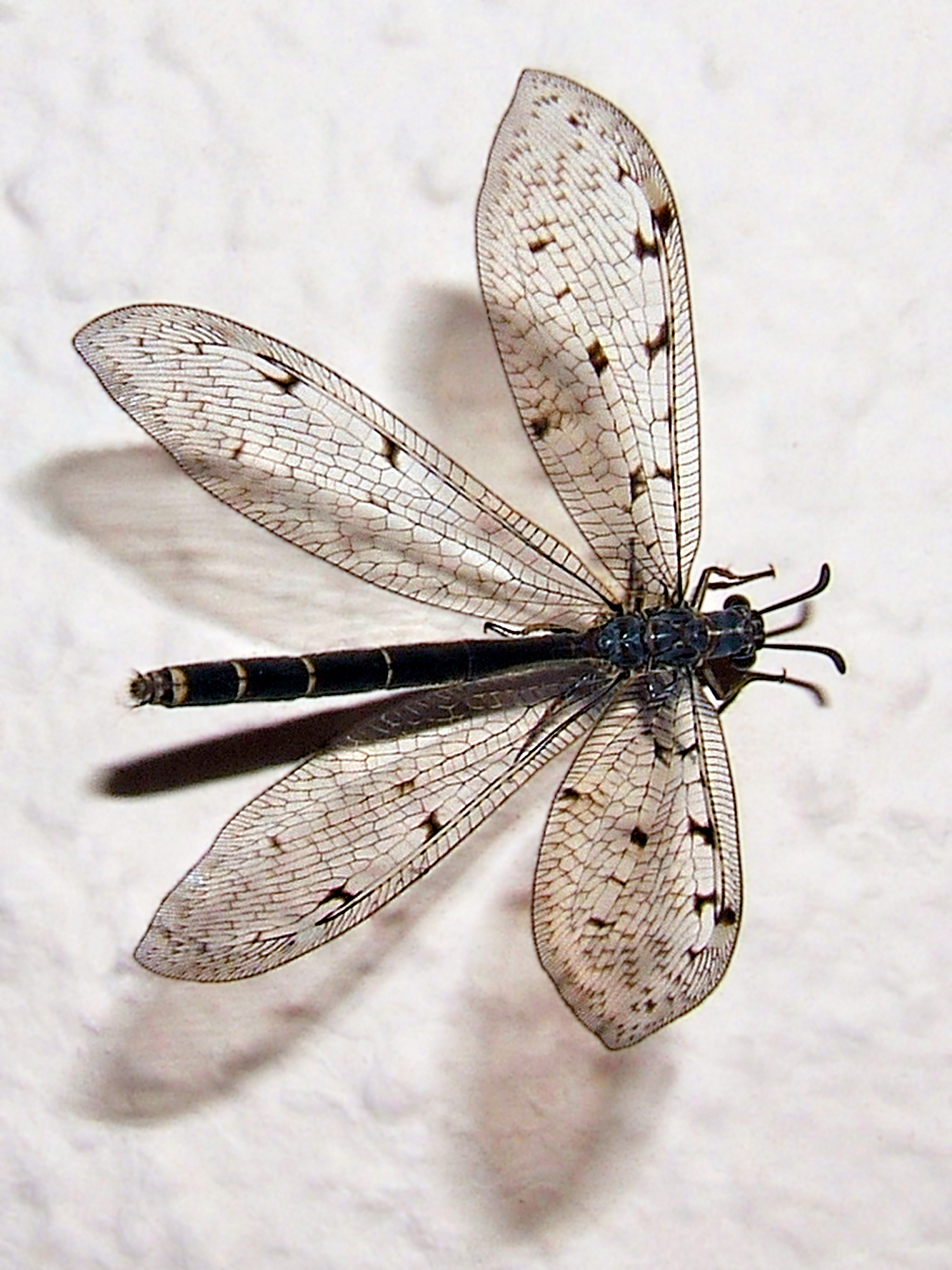 Euroleon_nostras